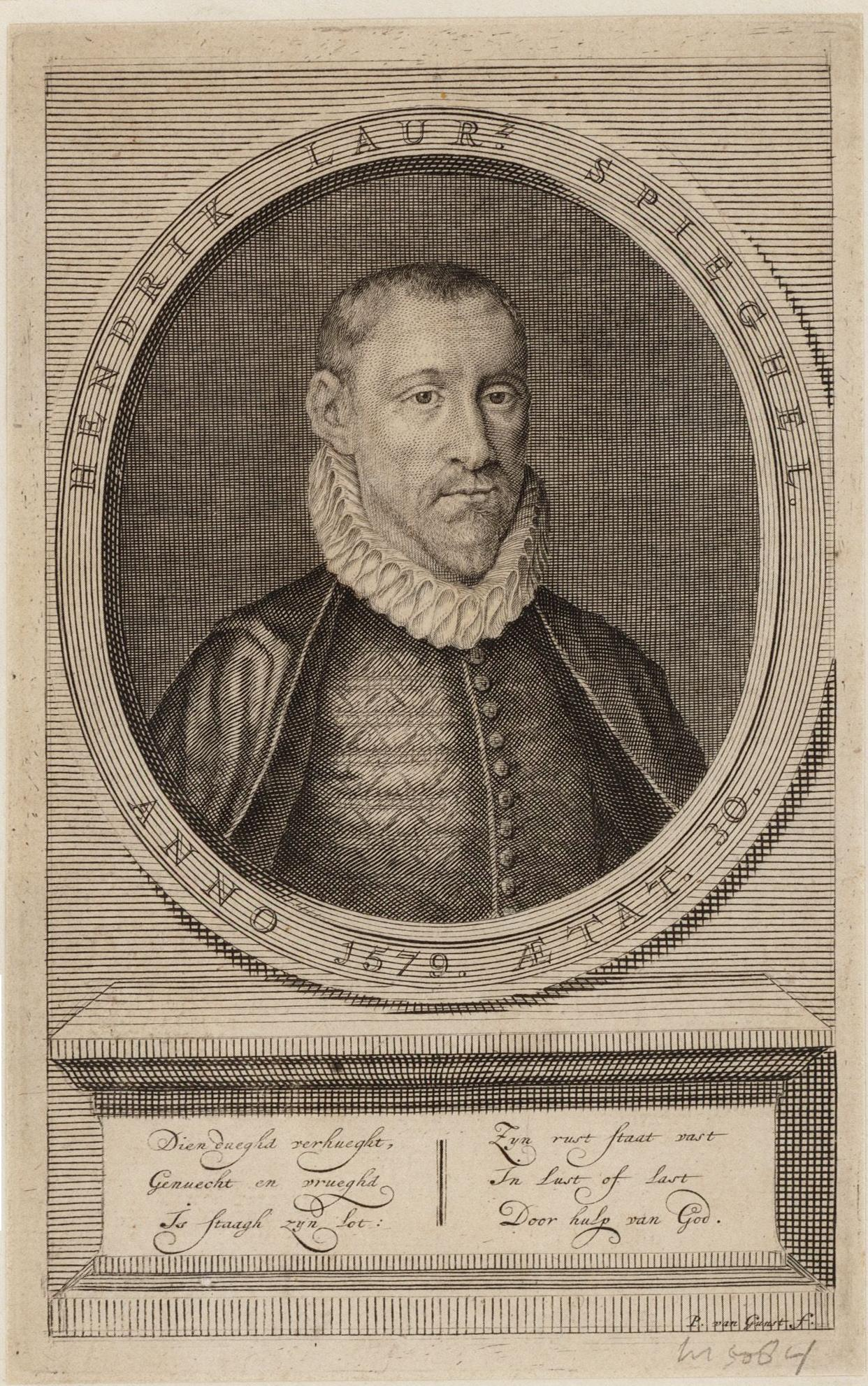 Portret van Hendrik Laurensz. Spiegel